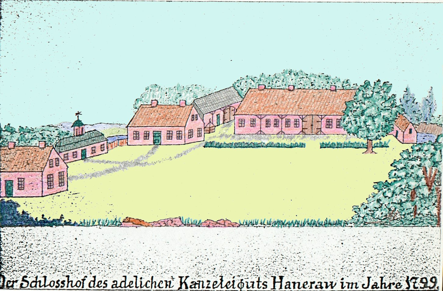 Zeichnung des Gutshofs von Johann Wilhelm Mannhardt in Hanerau, wie er Anfang des 19. Jahrhunderts ausgesehen hat. Sie entstammt dem Zeichenbuch von Wilhelm Mannhardt, könnte aber auch von den Geschwistern erstmalig gemalt worden sein. Wilhelm wurde 1800 geboren. Eindeutig ist, dass der Hof im Jahre 1799 ein anderes Gesicht hatte; denn es stand nur das Torhaus, das große Gebäude (2. von rechts). Im Vordergrund sind Gesteinsreste des vorherigen, 1782–1784 abgebrochenen Herrenhauses zu sehen. Alle anderen Gebäude wurden erst unter Johann Wilhelm Mannhardt gebaut und standen 1799 sicher noch nicht.